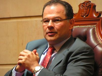 Luis Humberto Gómez Gallo, exsenador del Partido Conservador de Colombia